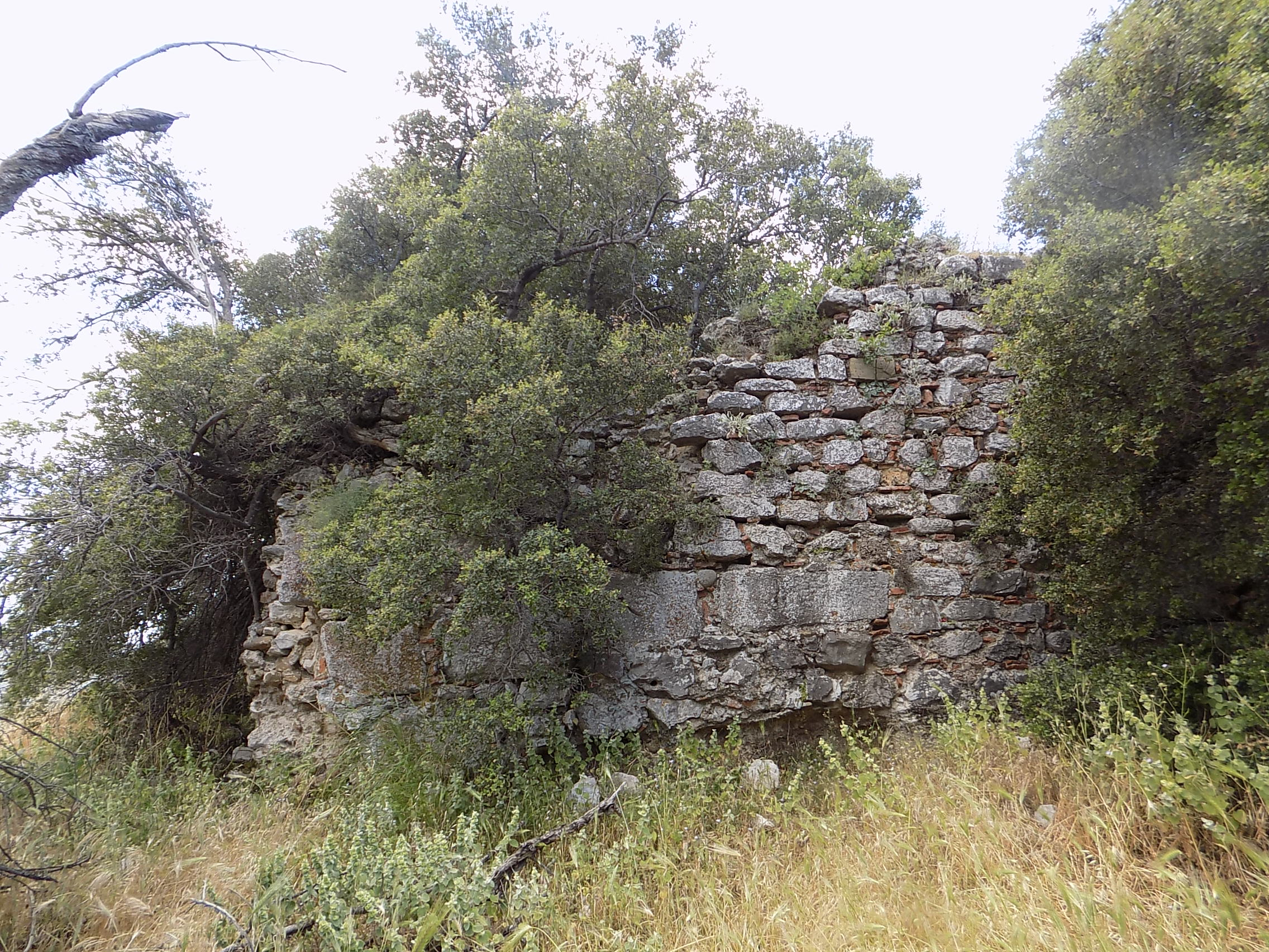 Κάστρο Οσίου Λουκά